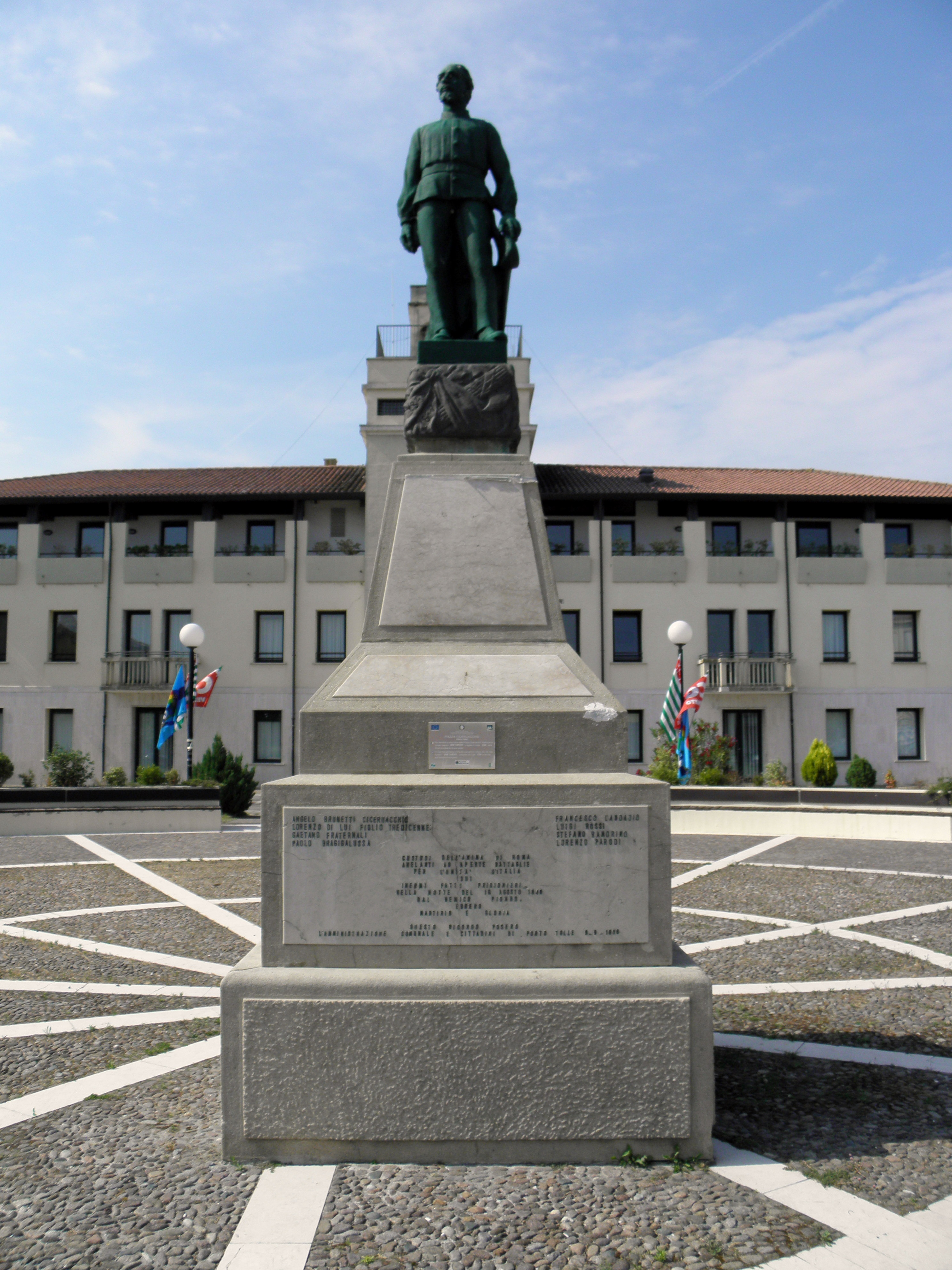 Ca' Tiepolo, frazione e sede del comune sparso di Porto Tolle: il monumento dedicato a Ciceruacchio, al secolo Angelo Brunetti, posto sull'omonima Piazza di fronte al palazzo municipale.